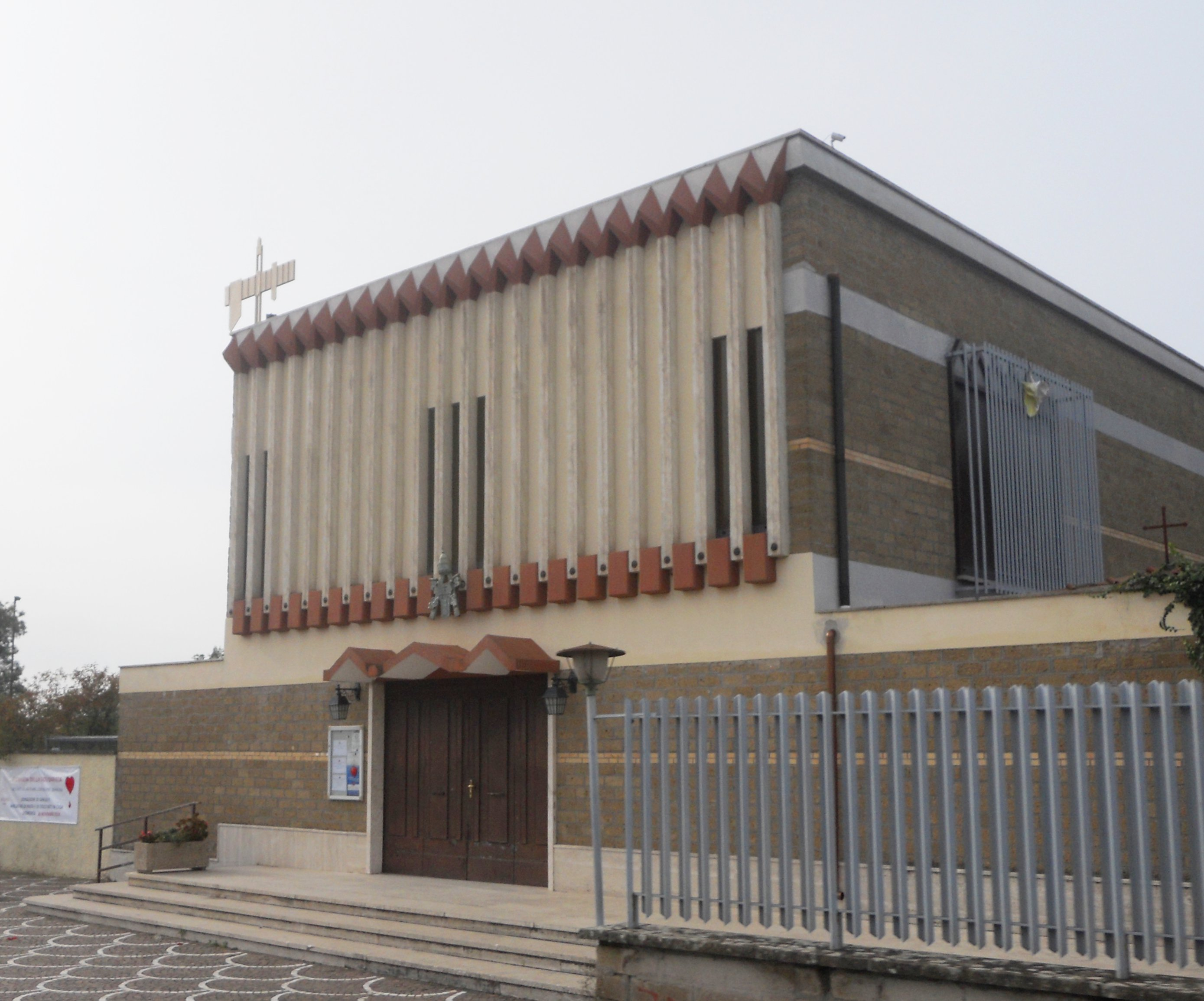 Esterno della chiesa di Sant'Eligio a Villaggio Prenestino.